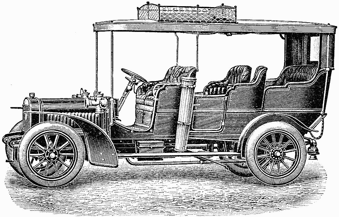 Original: Adler-Tonneau, sechssitzig, mit seitlichem Einstieg, Sommerdach und 24 pferdigem Vierzylindermotor Wahrscheinlich Adler 24/28 PS (1904-1905)